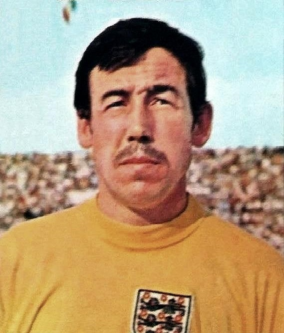 Gordon Banks en 1970 - WORLD CUP 1970